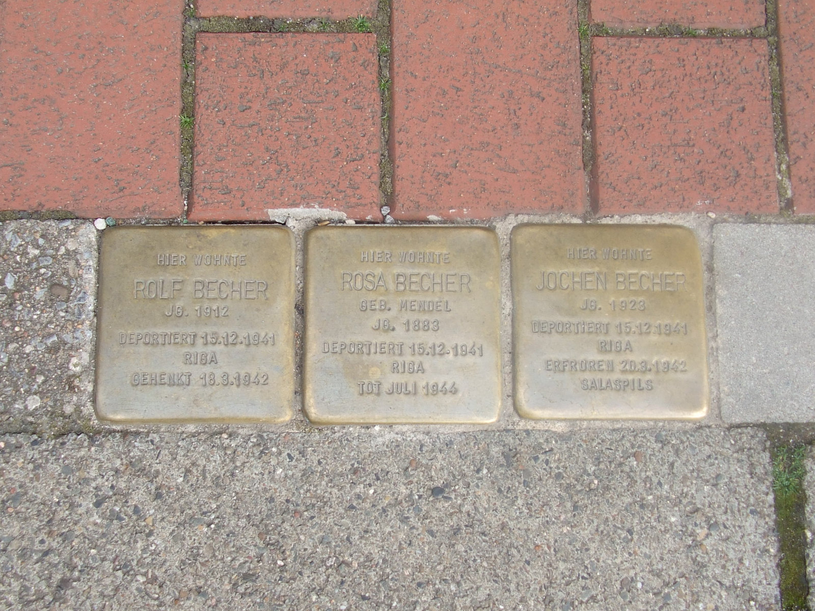 Stolpersteine in Hannover-Nordstadt